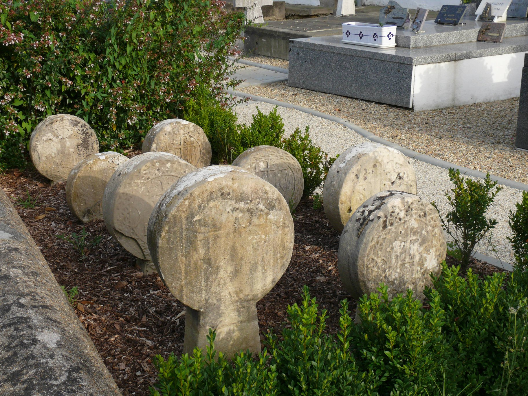 Saint-Laurent's church of Arbonne (Pyrénées-Atlantiques, Aquitaine, France).